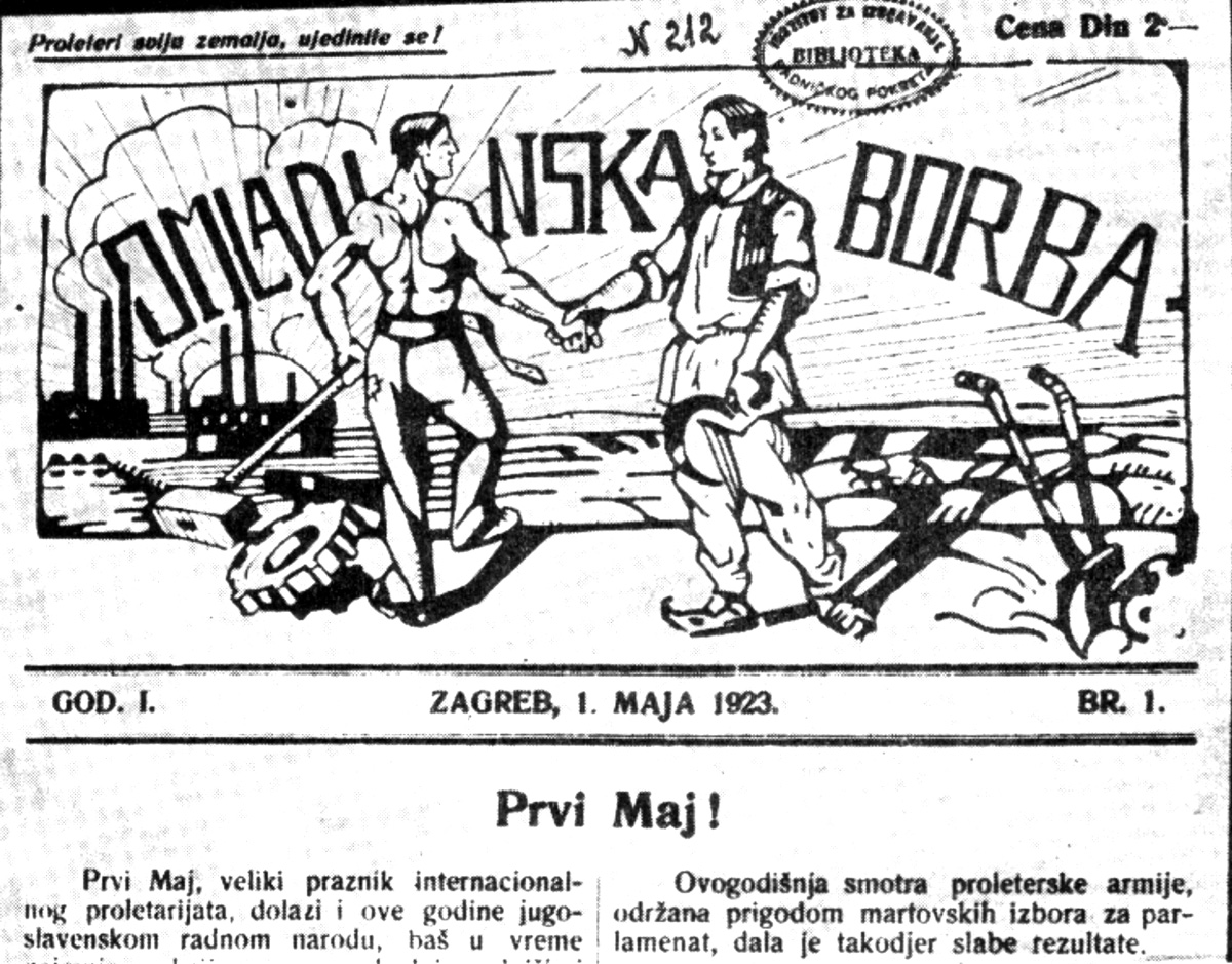 Srpskohrvatski / српскохрватски: Časopis Omladinska borba pokrenut prvog maja 1923. godine u Zagrebu.